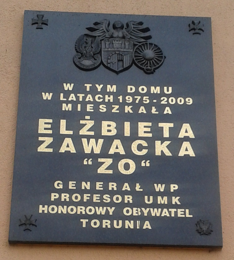 Tablica pamiątkowa na bloku Gagarina 132-138 w Toruniu napis: W TYM DOMU W LATACH 1975-2009 MIESZKAŁA ELŻBIETA ZAWACKA "ZO" GENERAŁ WP PROFESOR UMK HONOROWY OBYWATEL TORUNIA